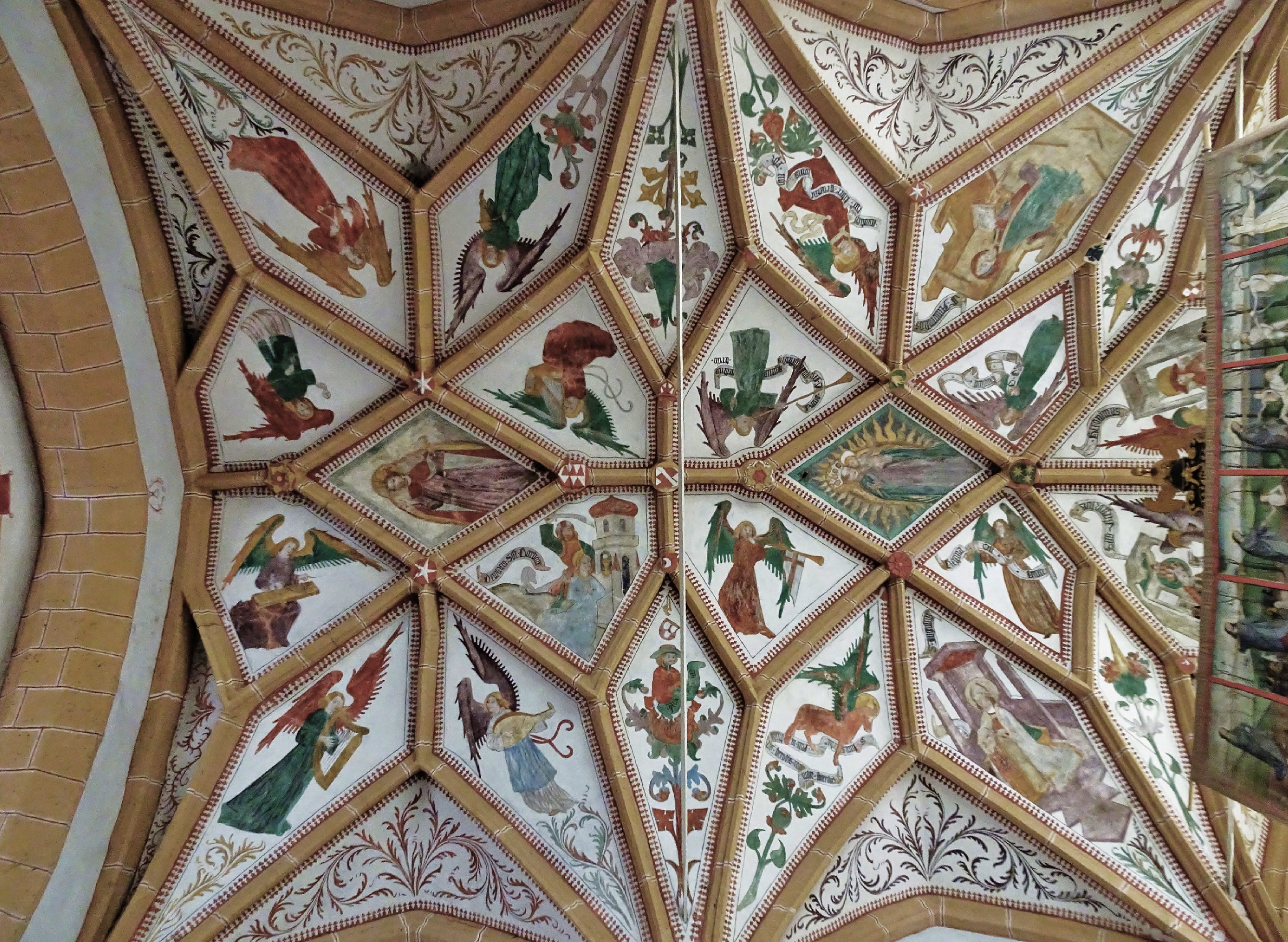 Kath. Pfarrkirche Haimburg (Völkermarkt), Netzrippengewölbe im Chor mit Freskomalerei